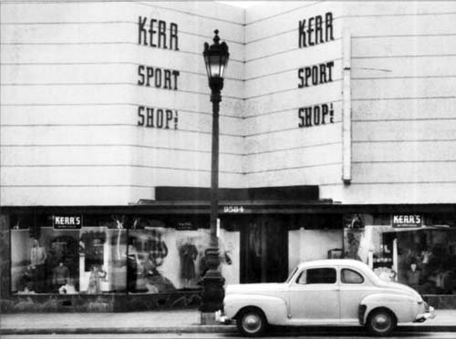 Kerr's Department Store in Beverly Hills